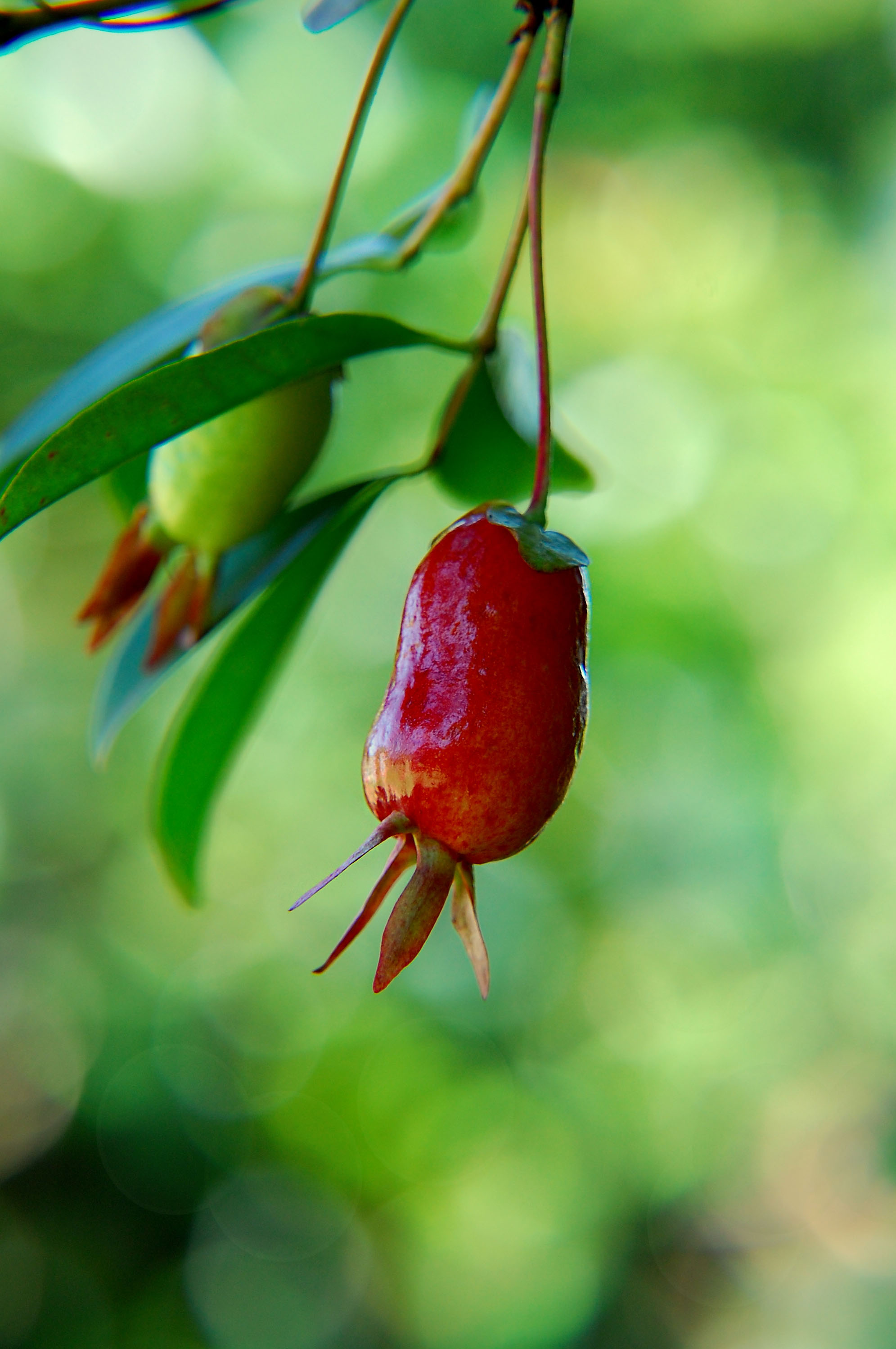 fruto